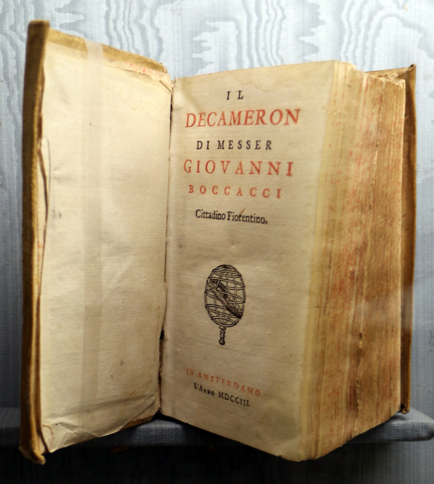 Biblioteca Marucelliana This is a photo of a monument which is part of cultural heritage of Italy.